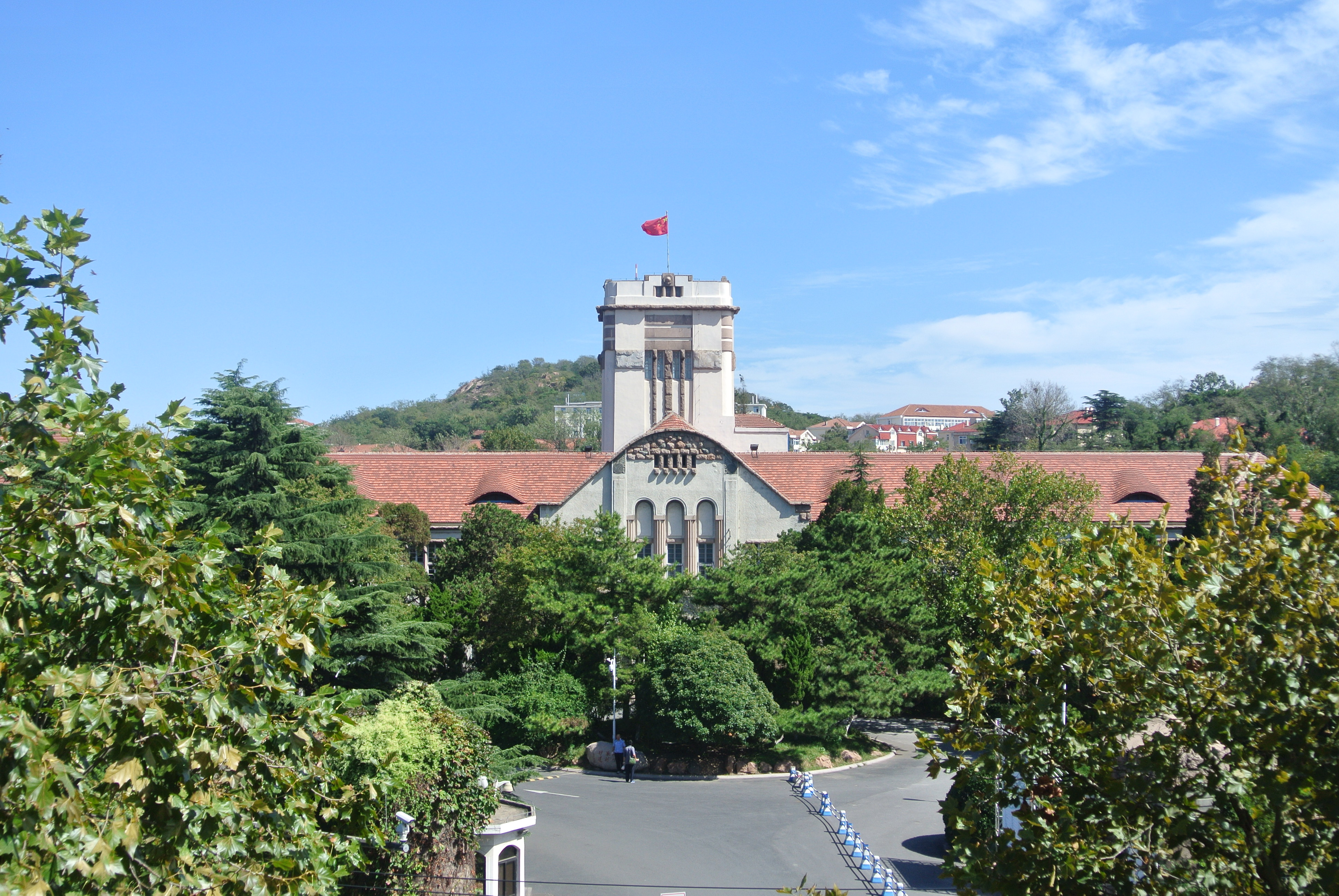 青岛日本中学校